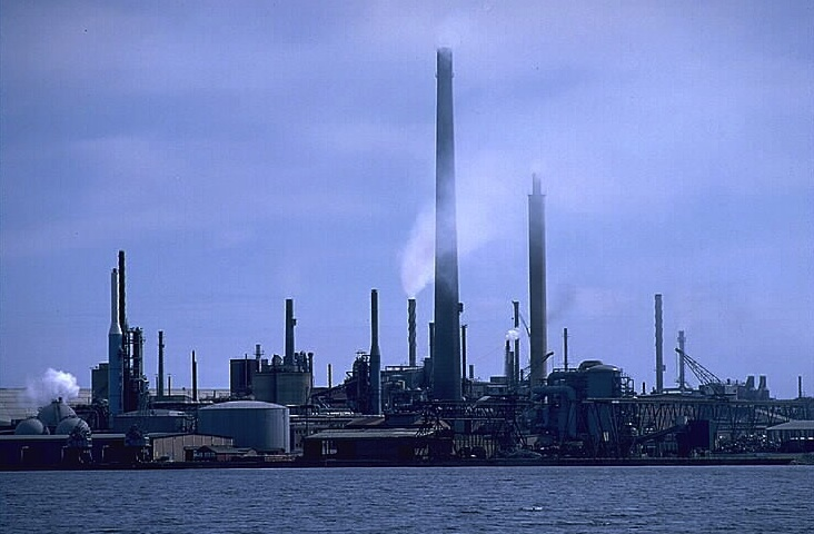 Smältverk. Bilden troligen från slutet av 1970-talet.